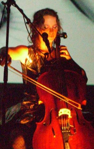 Jorane de son vrai nom Johanne Pelletier, est une chanteuse et violoncelliste québécoise née le 12 octobre 1975.